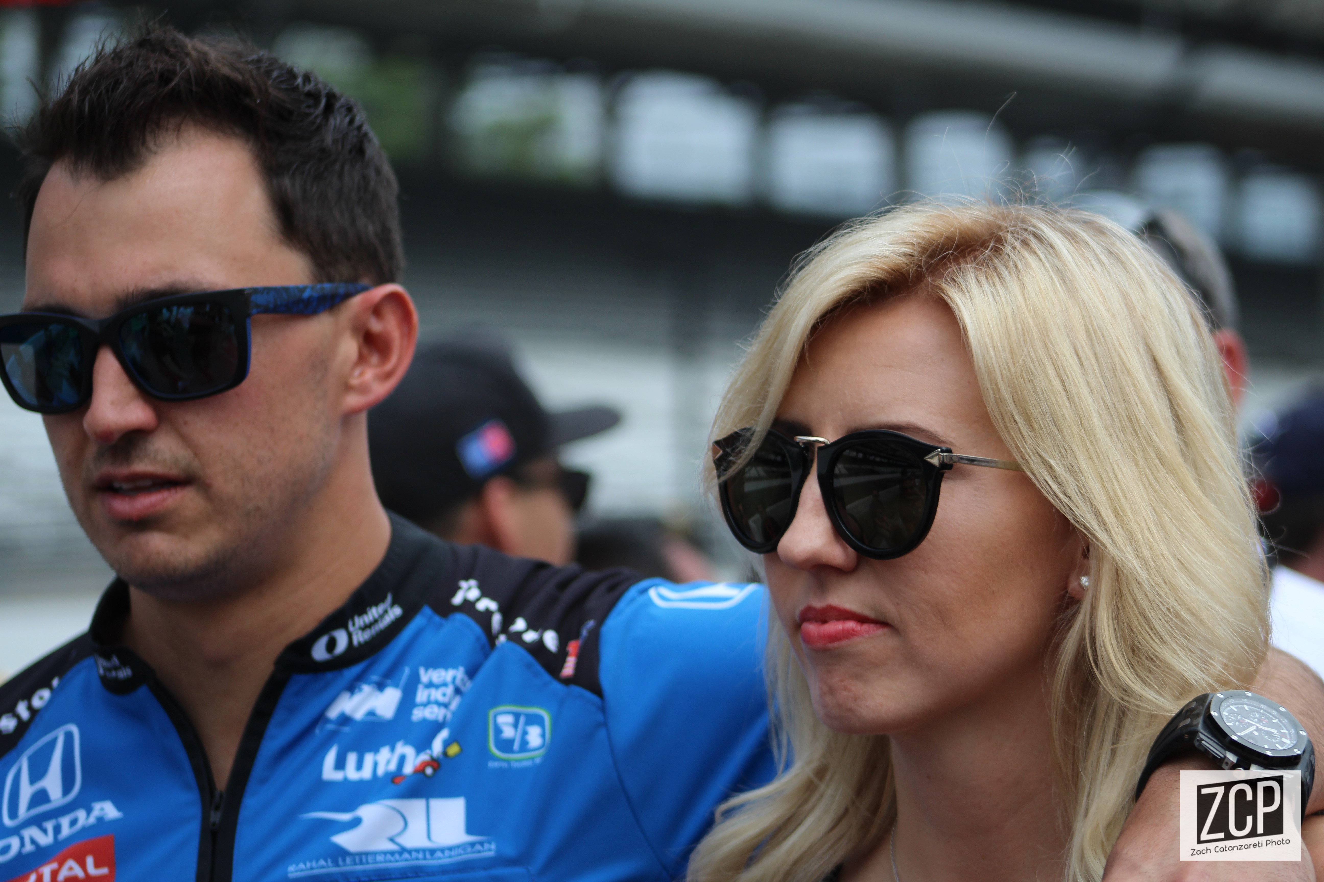 2018 Indianapolis 500